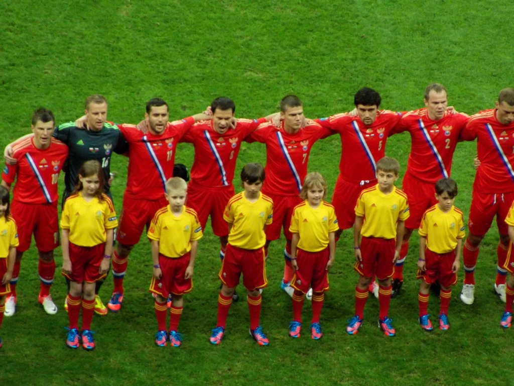 Zdjęcie zrobione w piątym dniu UEFA Euro 2012 w Warszawie, marszu rosyjskich kibiców i meczu Polska-Rosja.